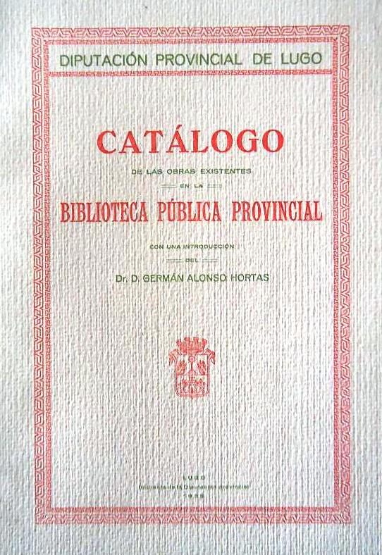 Catálogo de las obras existentes en la Biblioteca Pública Provincial con una introducción del Dr. D. Germán Alonso Hortas. Lugo. 1935.